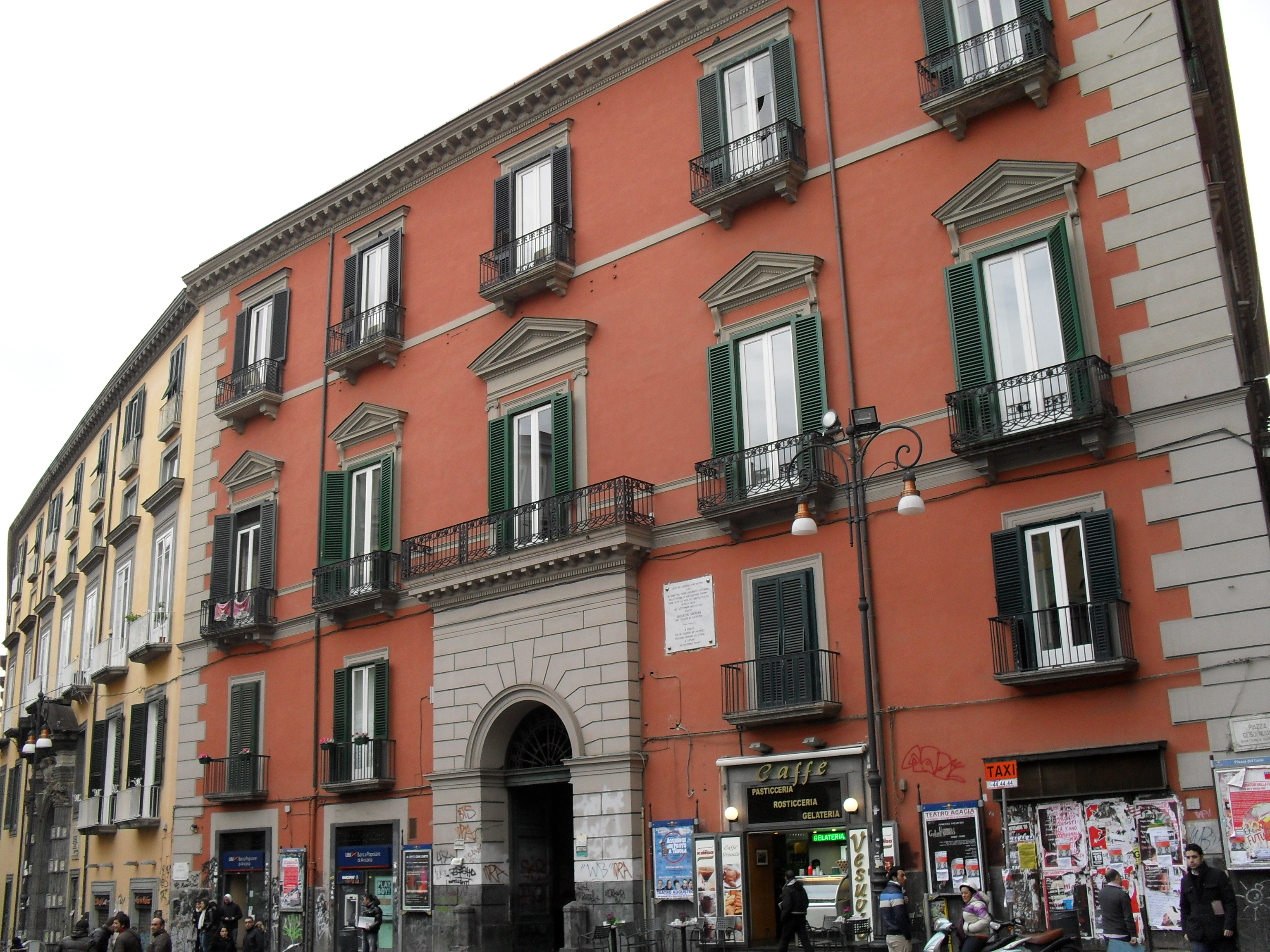 Palazzo Pandola (Napoli)